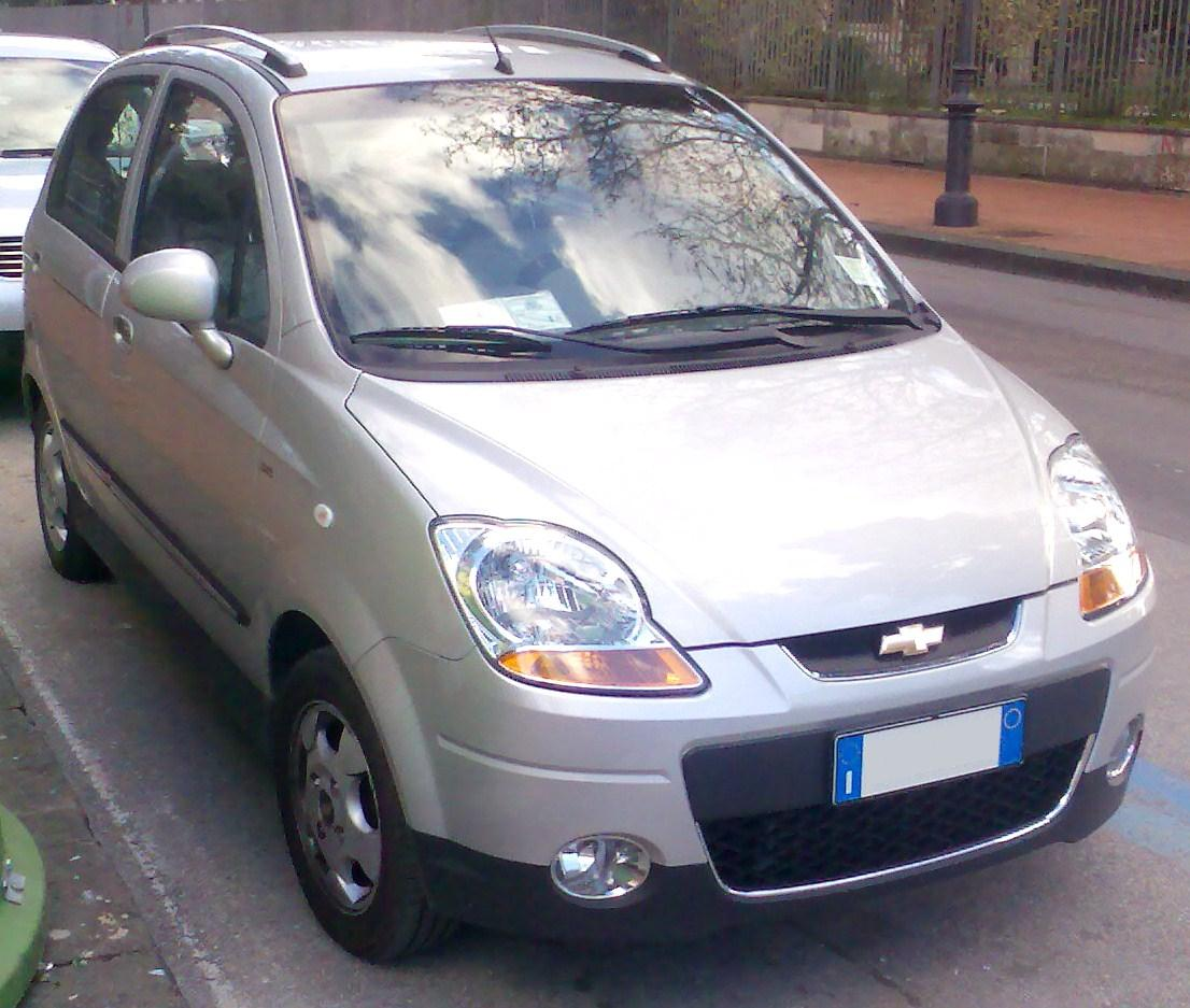 Chevrolet Matiz cromata